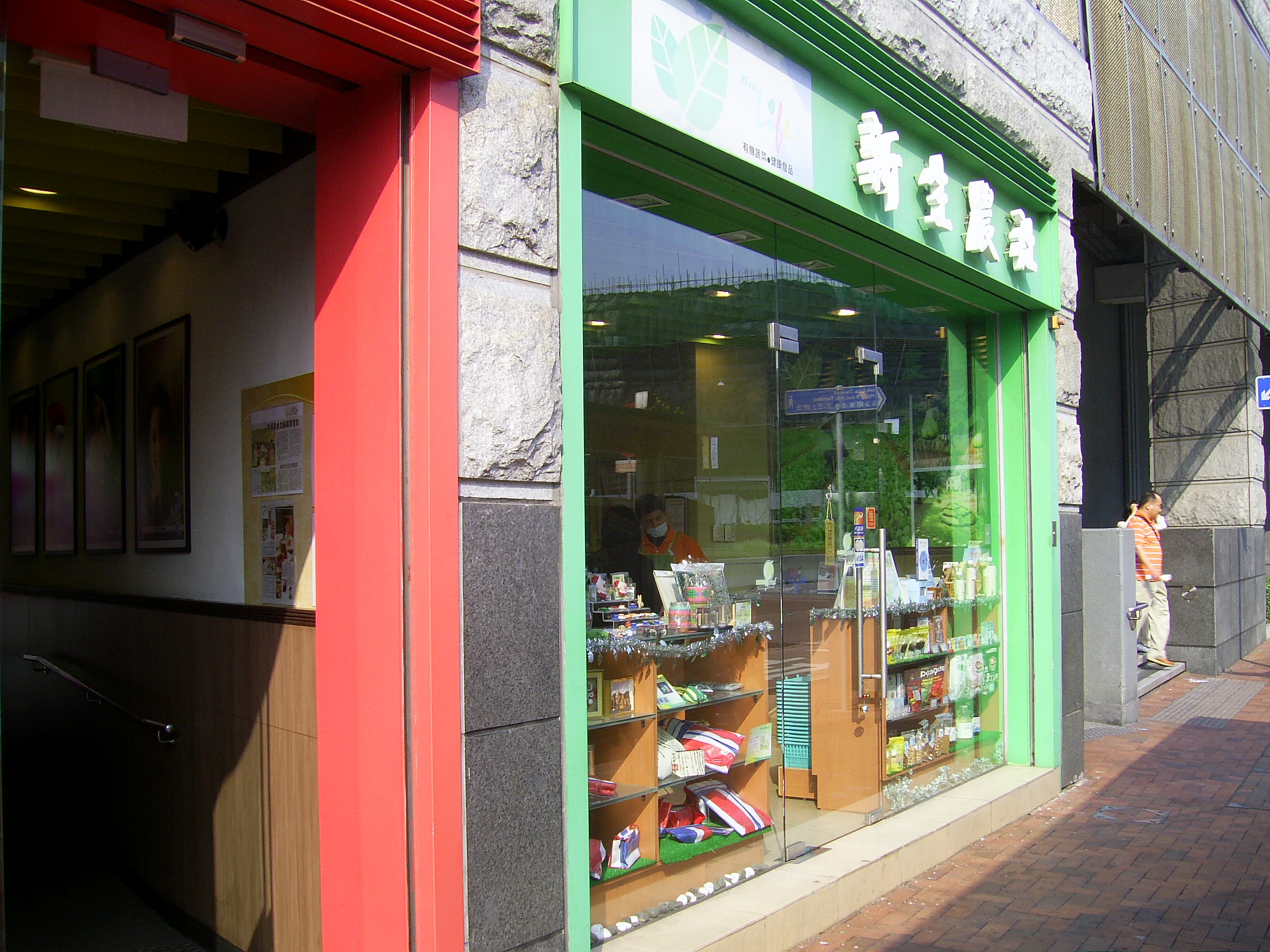 中文（香港）: 中間道兒童遊樂場下的新生農社